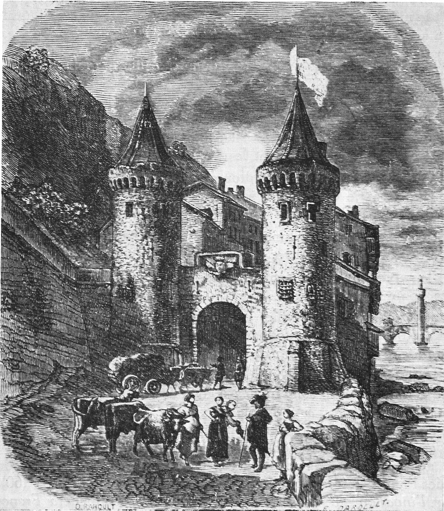 Porte Perrière (1533) au bord de l'Isère - Grenoble